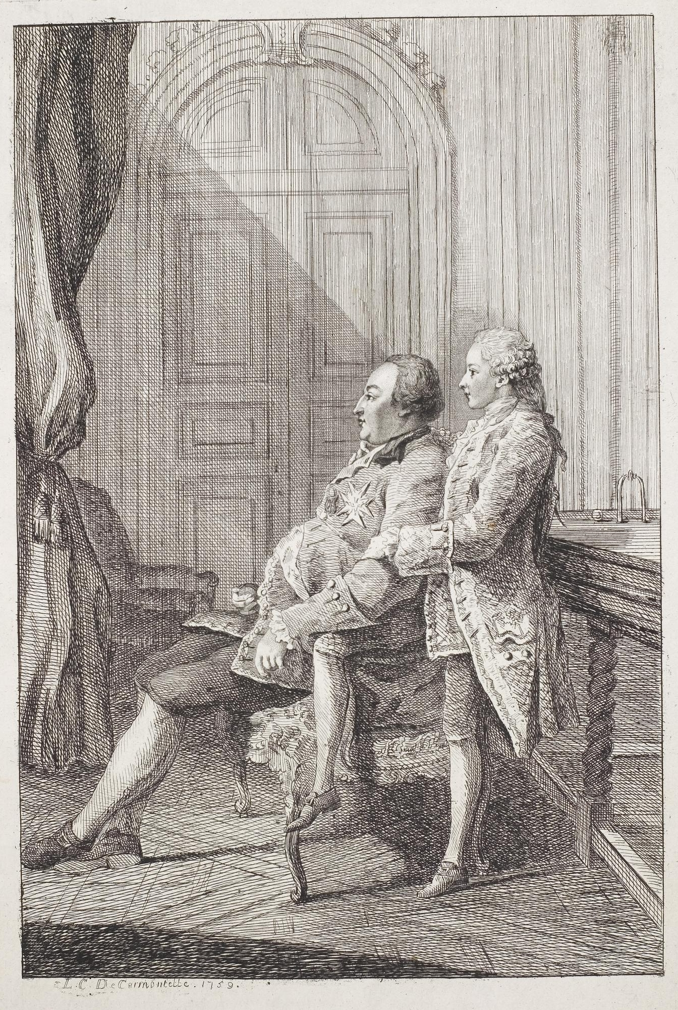 Grafik aus dem Klebeband Nr. 14 der Fürstlich Waldeckschen Hofbibliothek Arolsen Motiv: (handschriftlich:) M. le Duc d'Orleans et M. le duc de Chartres""